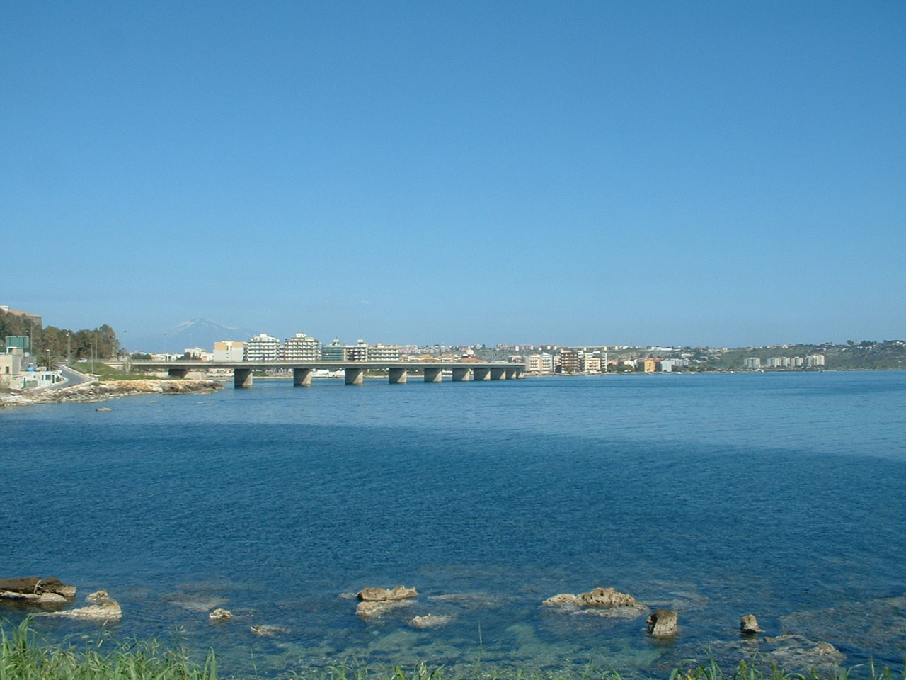 Augusta (SR), Viadotto Federico II visto da Via Marina di Levante.